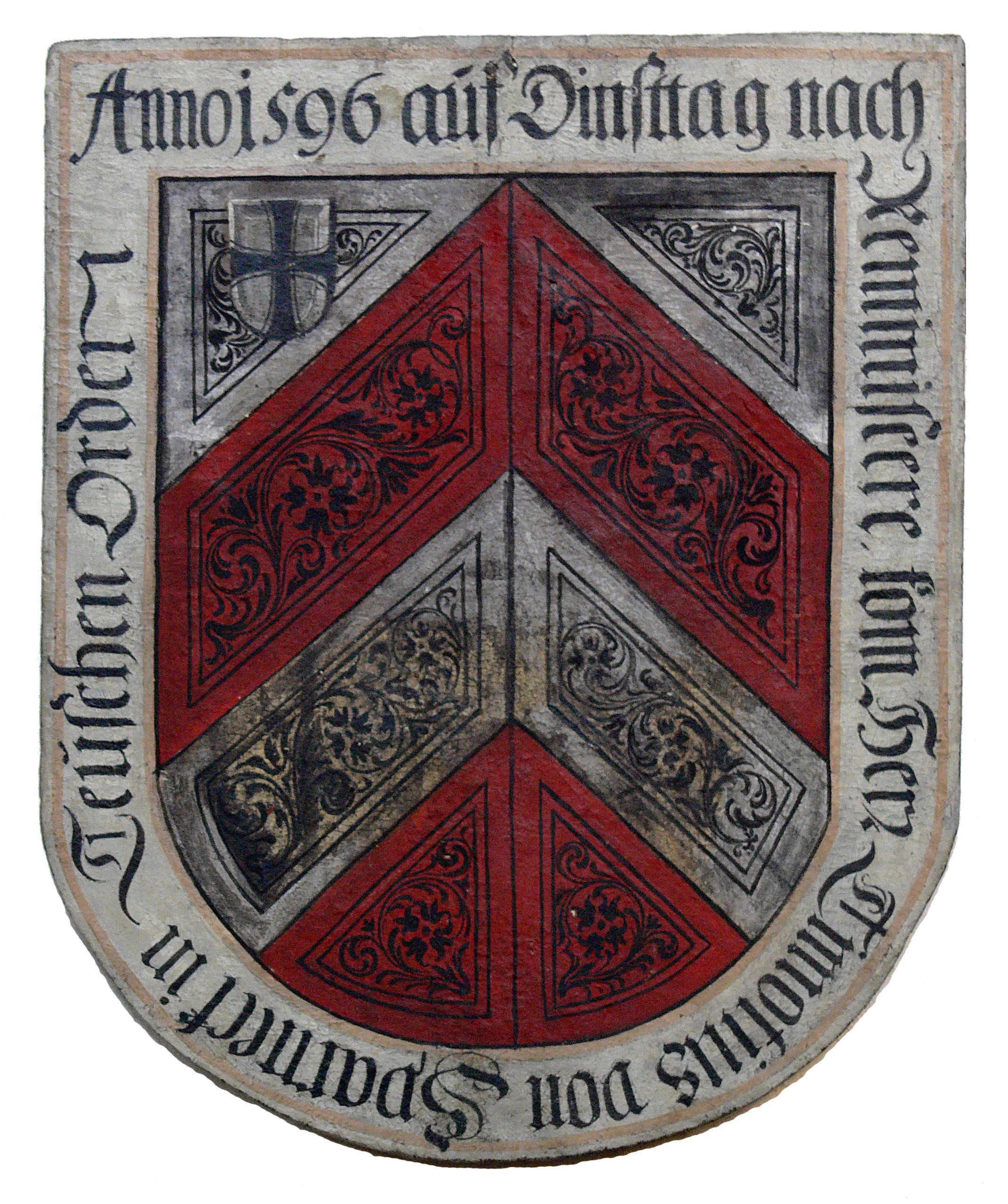 Nürnberg, Kirche St. Jakob Aufschwörschild des Deutschen Ordens von Timoteus von Sparneck, 1596 (näheres hier)